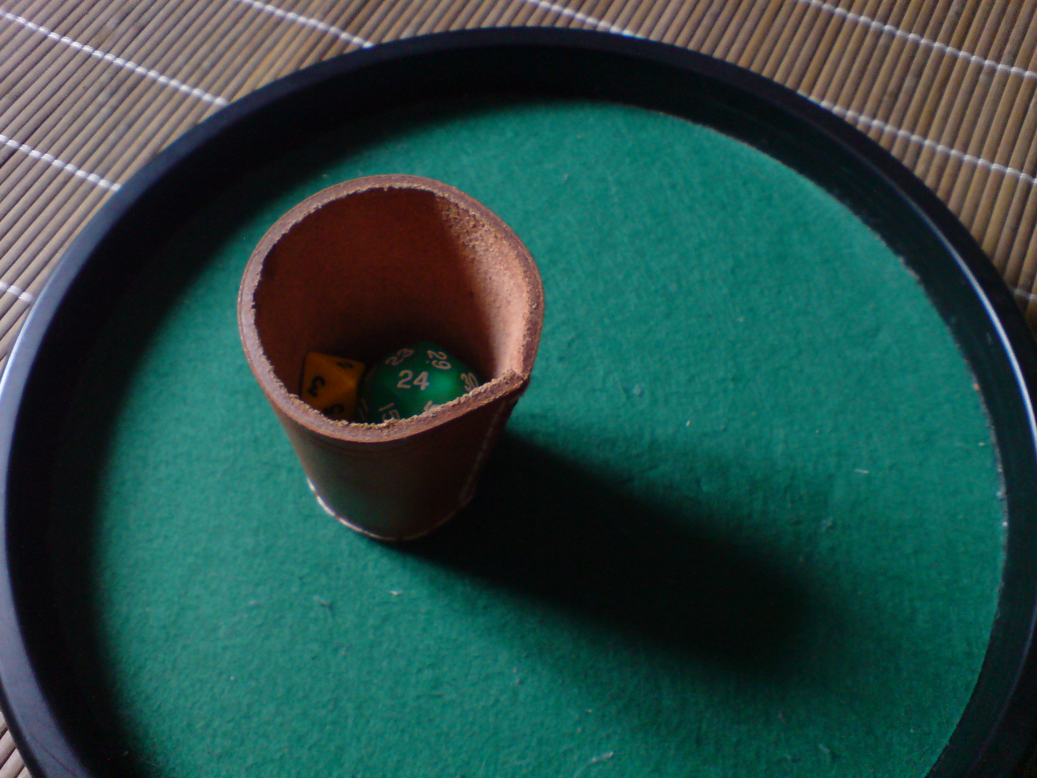 Il s'agit d'une aire de lancement de dé.